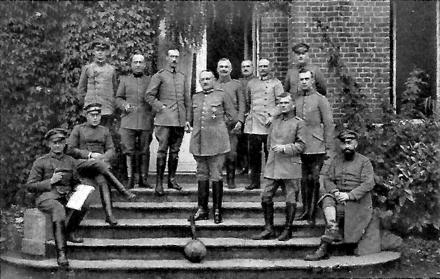 Stab der 13. I. D. vor dem Schloß in Marquillies, In der Mitte: Generalleutnant v. d. Borne